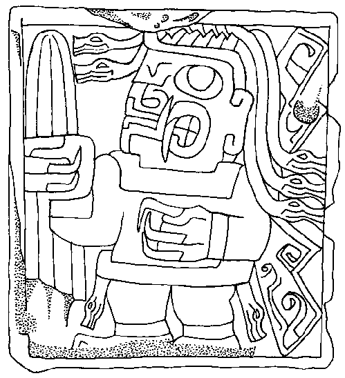 Inka Relief eines Priesters o. Gottes mit Säulenkaktus in der Hand